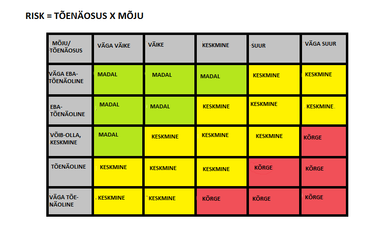 Tõenäosuse ja mõjukuse maatriks